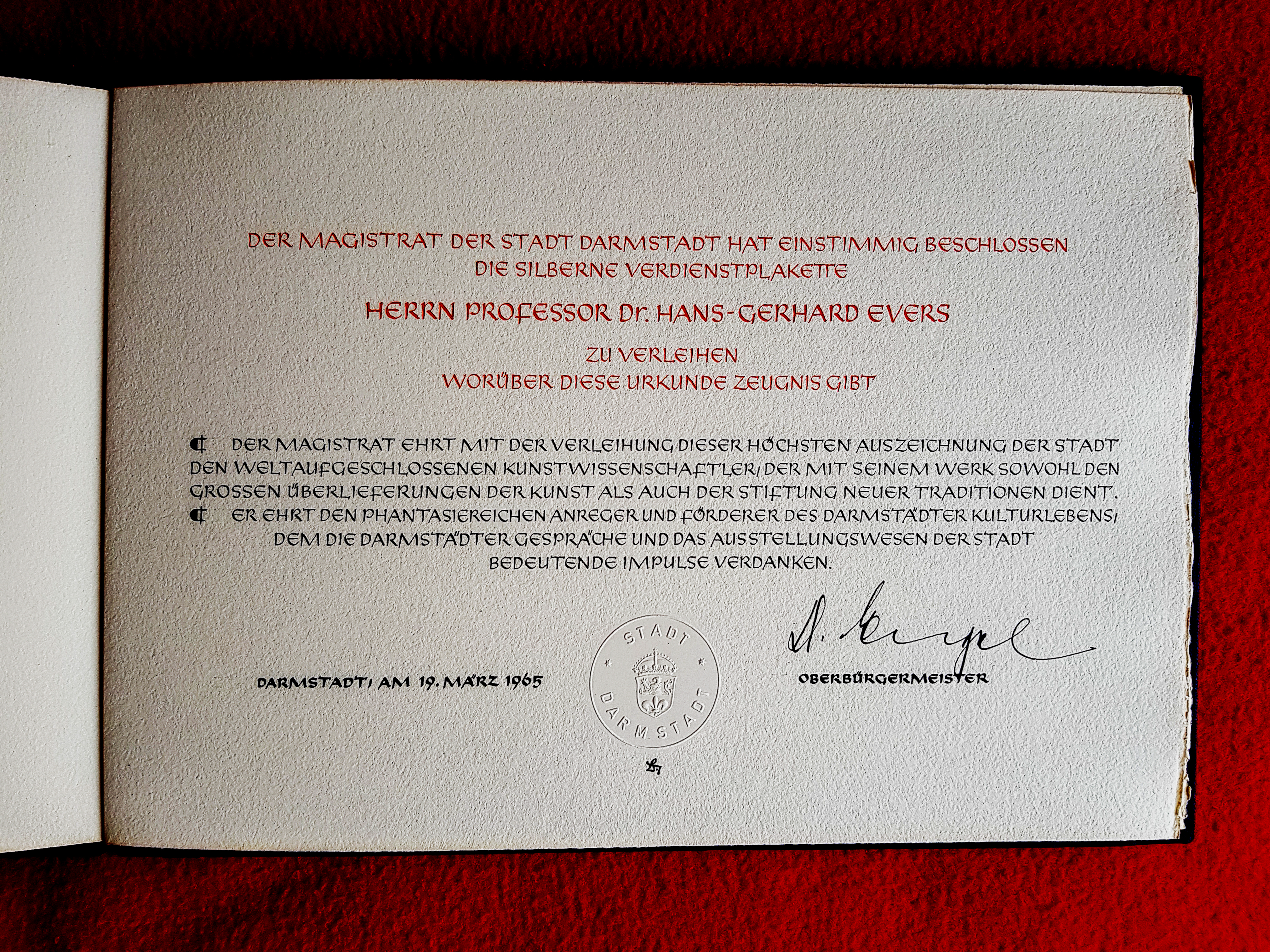 Die Silberne Verdienstplakette Darmstadt wurde mit einer Silbermünze und einer Urkunde verliehen. Hier: Urkunde für Prof. Dr. Hans-Gerhard Evers, 1965